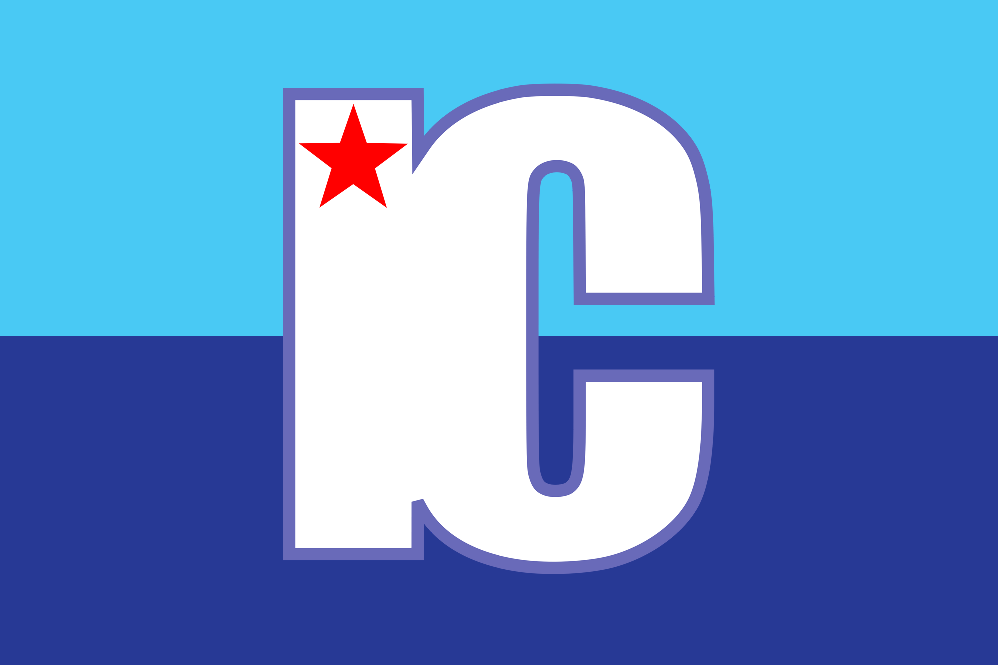 Bandera del Partido Izquierda Cristiana de Chile.